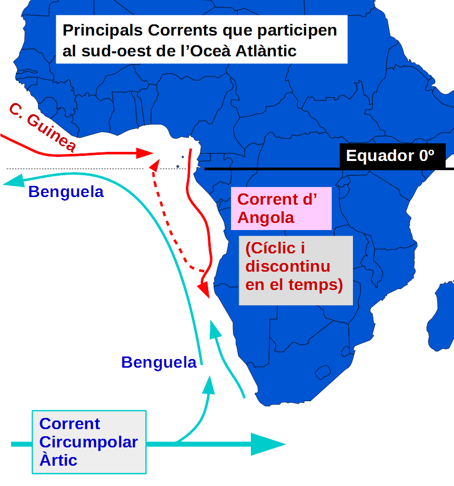 Sistema dels principals corrents oceànics que es poden localitzar a l'oest de l'Atlàntic Sud.